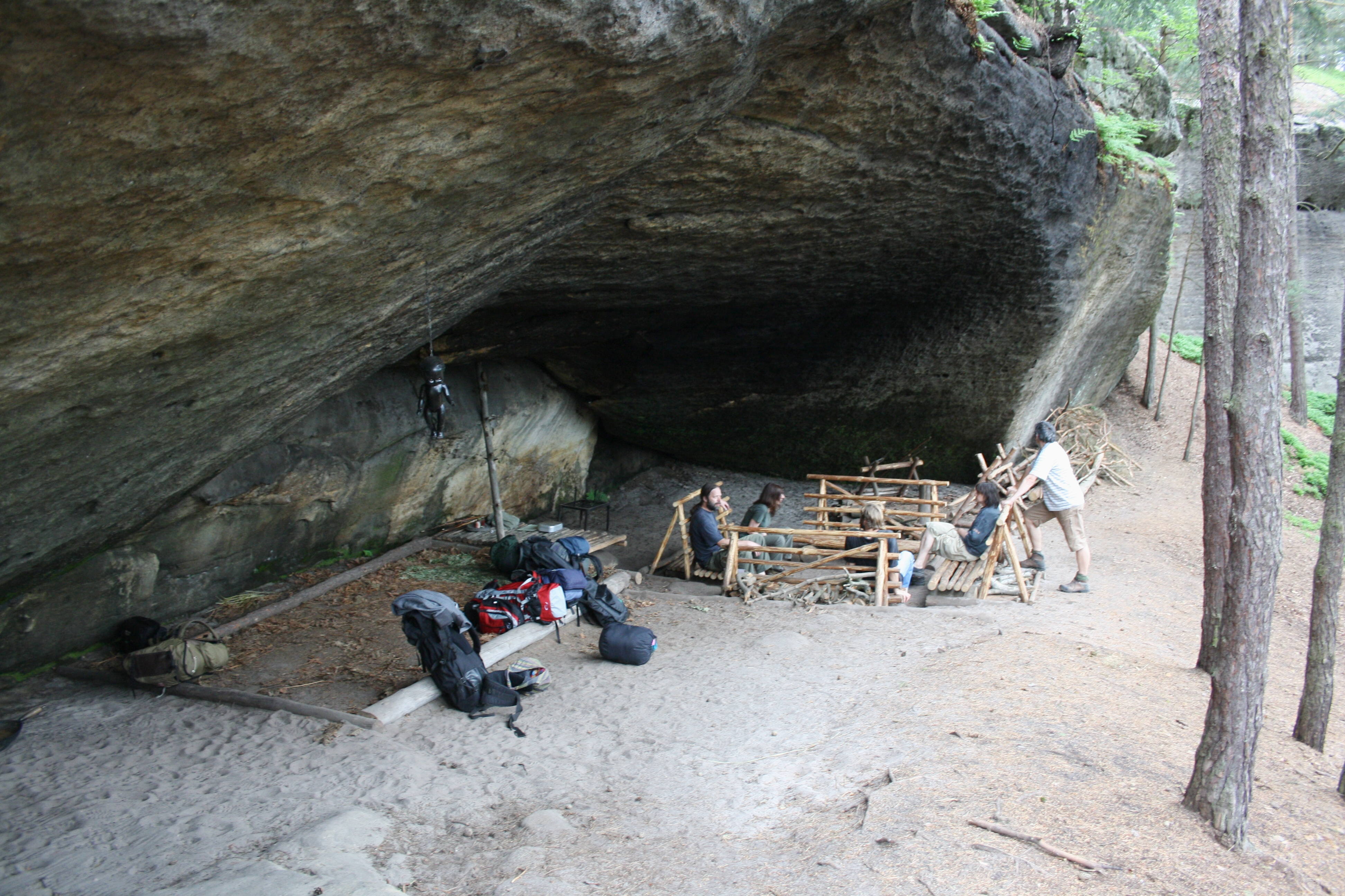 Trampský kemp Mrtvé dítě, kdesi v Roverkách